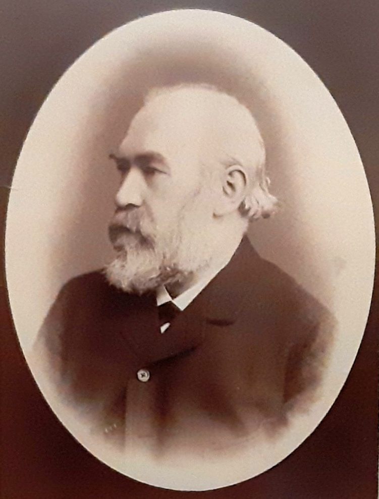 Foto von Karl Friedrich Emil Bönisch aus der Sammlung Otto Richter (Tafel 188) Atelier Ad. Hoffmann, Dresden Auskopierpapier, Cabinetformat, um 1880